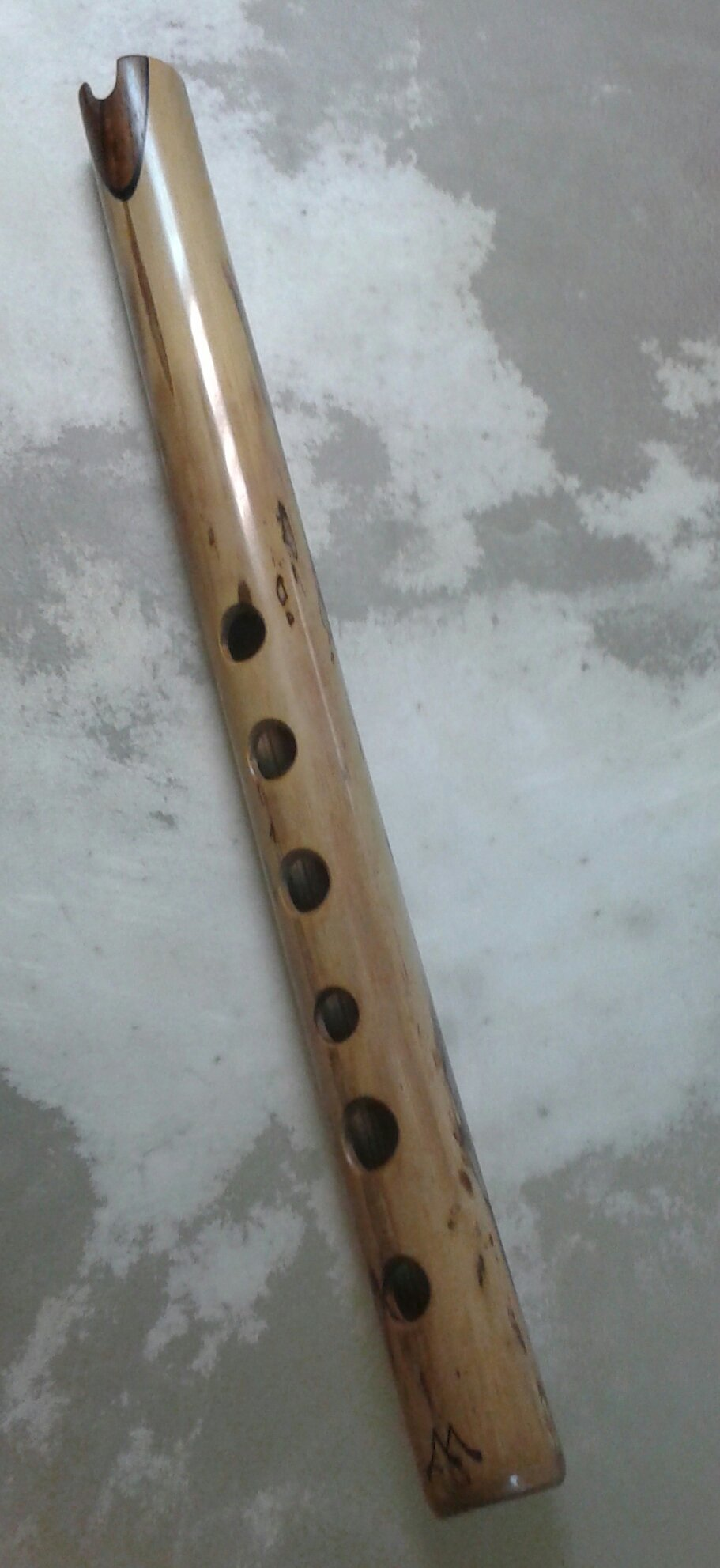 Quena de bambú con incrustación de maderas del luthier argentino Ángel Sampedro del Río (Un mundo de bambú).